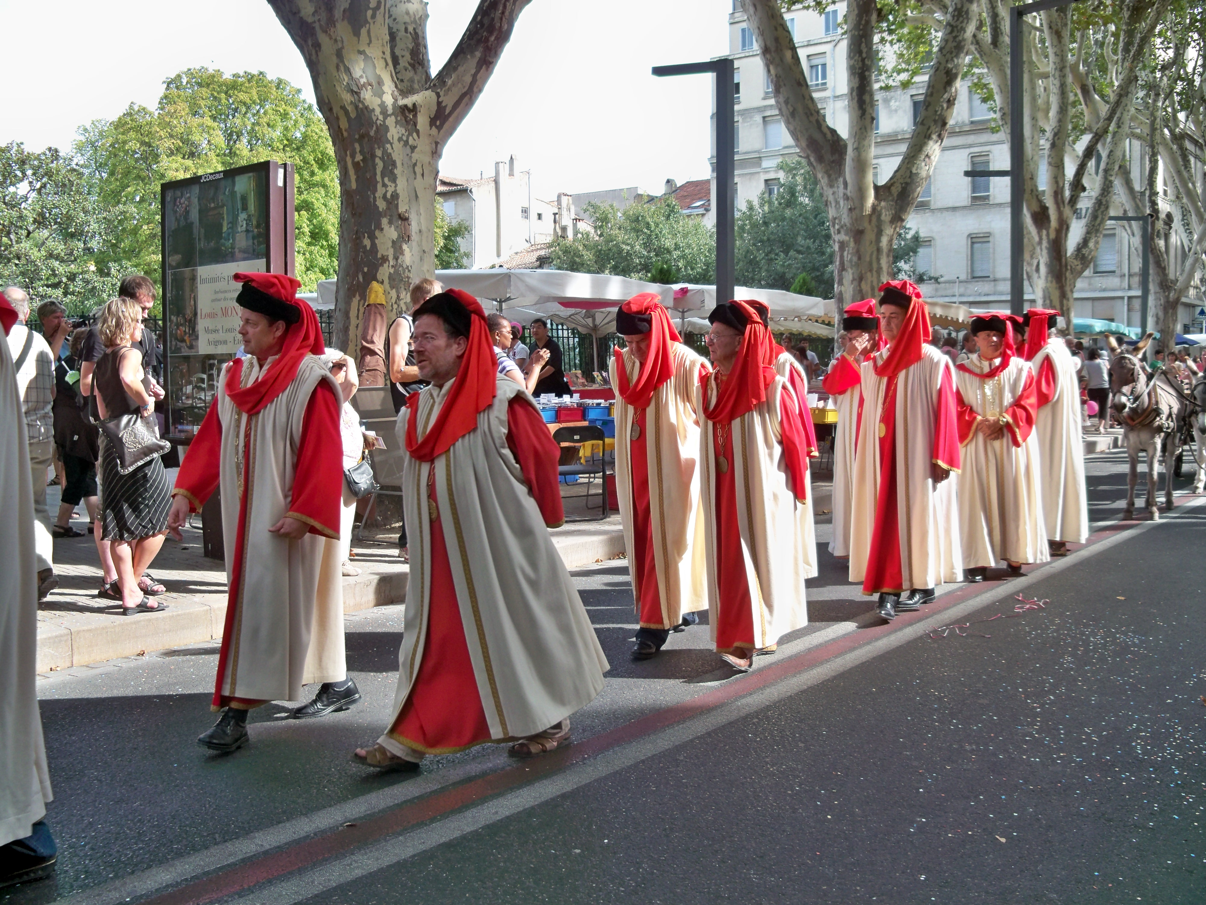 Défilé du Ban ds Vendanges 2010 à Avignon, Vaucluse, France